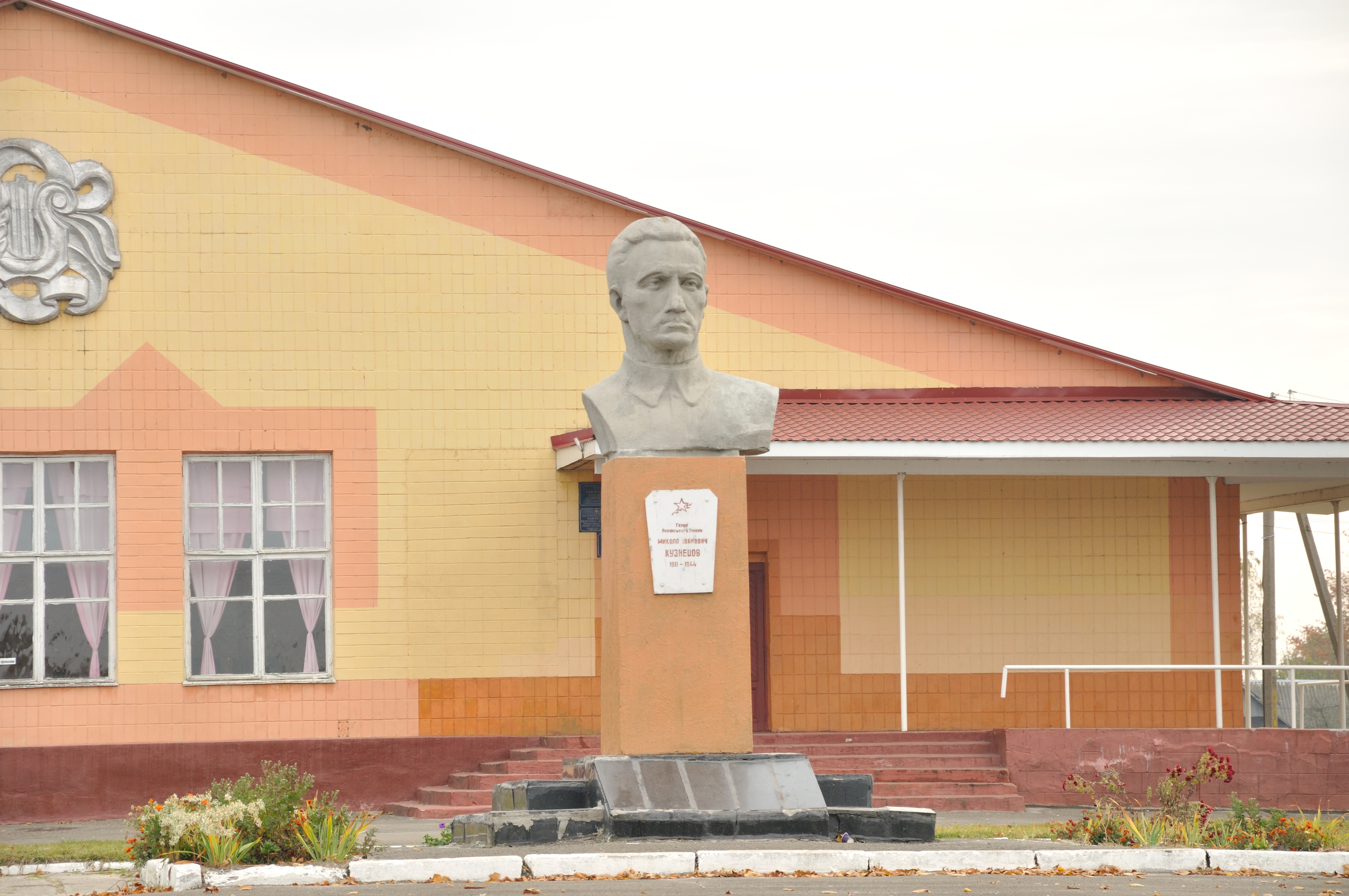 Пам'ятник розвіднику, Герою Радянського Союзу М. І. Кузнєцову, с. Кам'янка